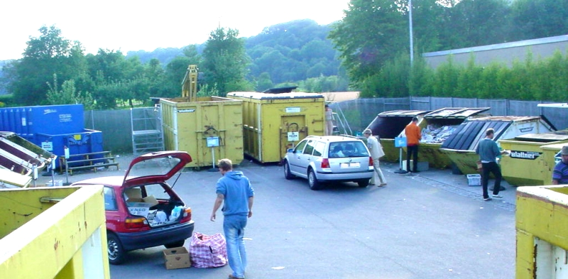 Wertstoffhof in Biberach/Riß